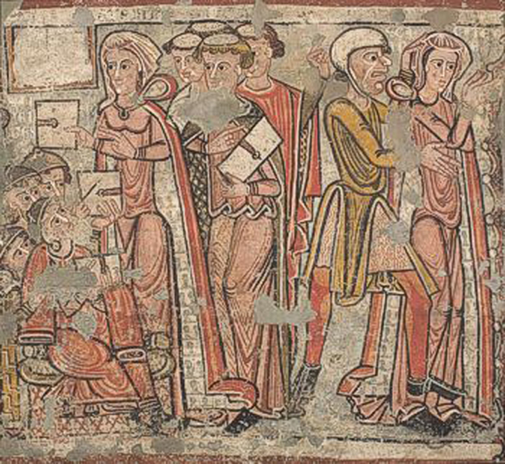 Pintura mural en la catedral de la Seu d'Urgell (Cataluña) Spain. Titulada La Disputa y el arresto de santa Catalina actualmente en el Museo Nacional de Arte de Cataluña.